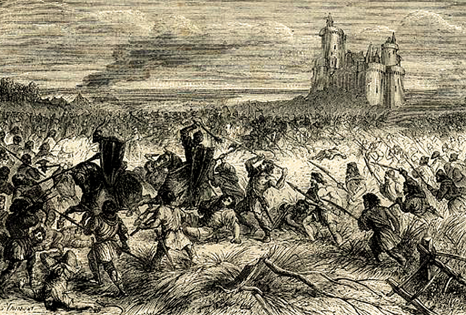 Peinture d'Édouard Vaumort, (?-1886), gravure de Jean Baptiste Amédée Guillaume, (1822-1893), parue dans Henri Martin, Histoire de France populaire, Paris, 1886.